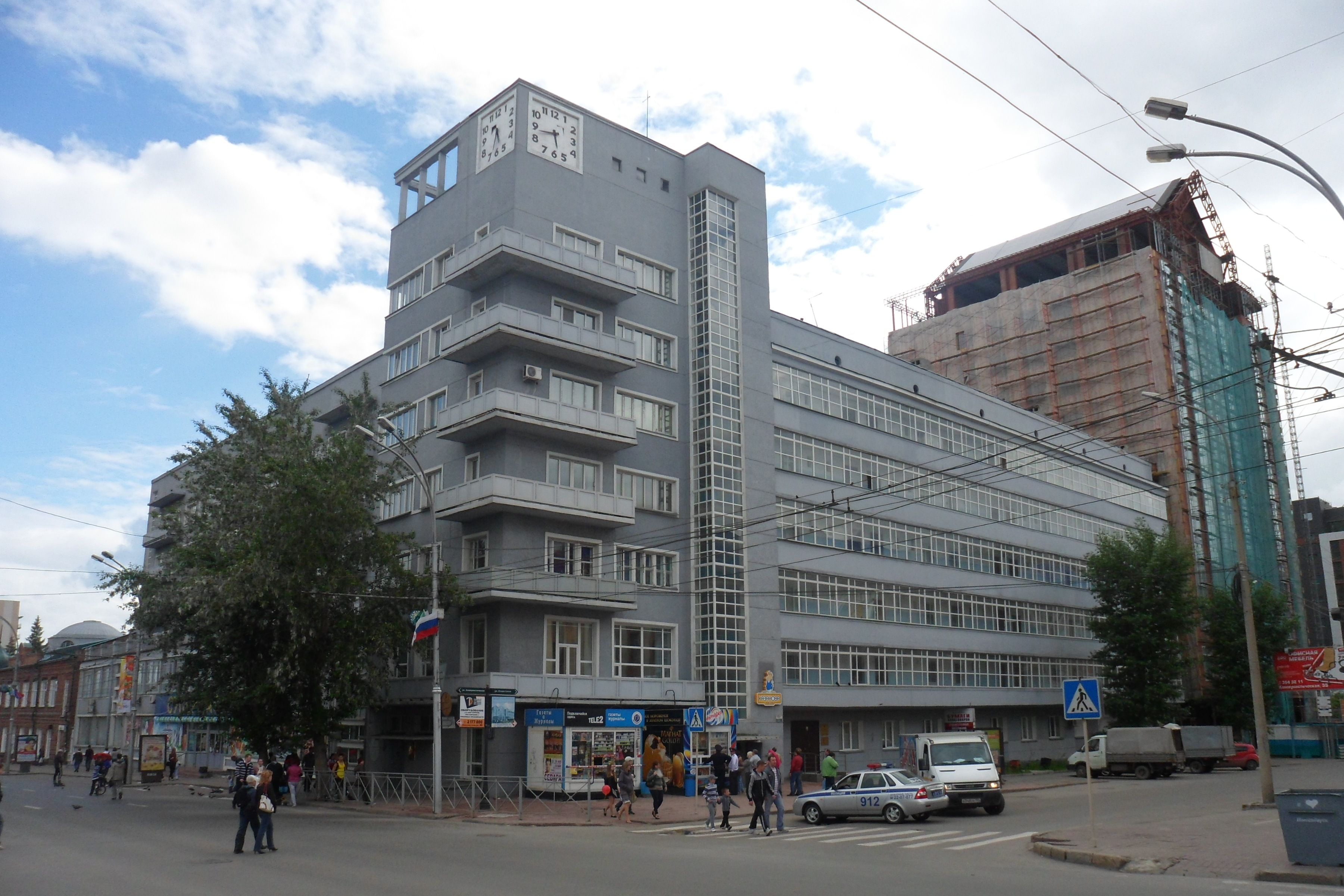 Построен 1931-1934гг. Один из первых домов галлерейного типа.(Новосибирская область, Новосибирск, Красный проспект, 11)